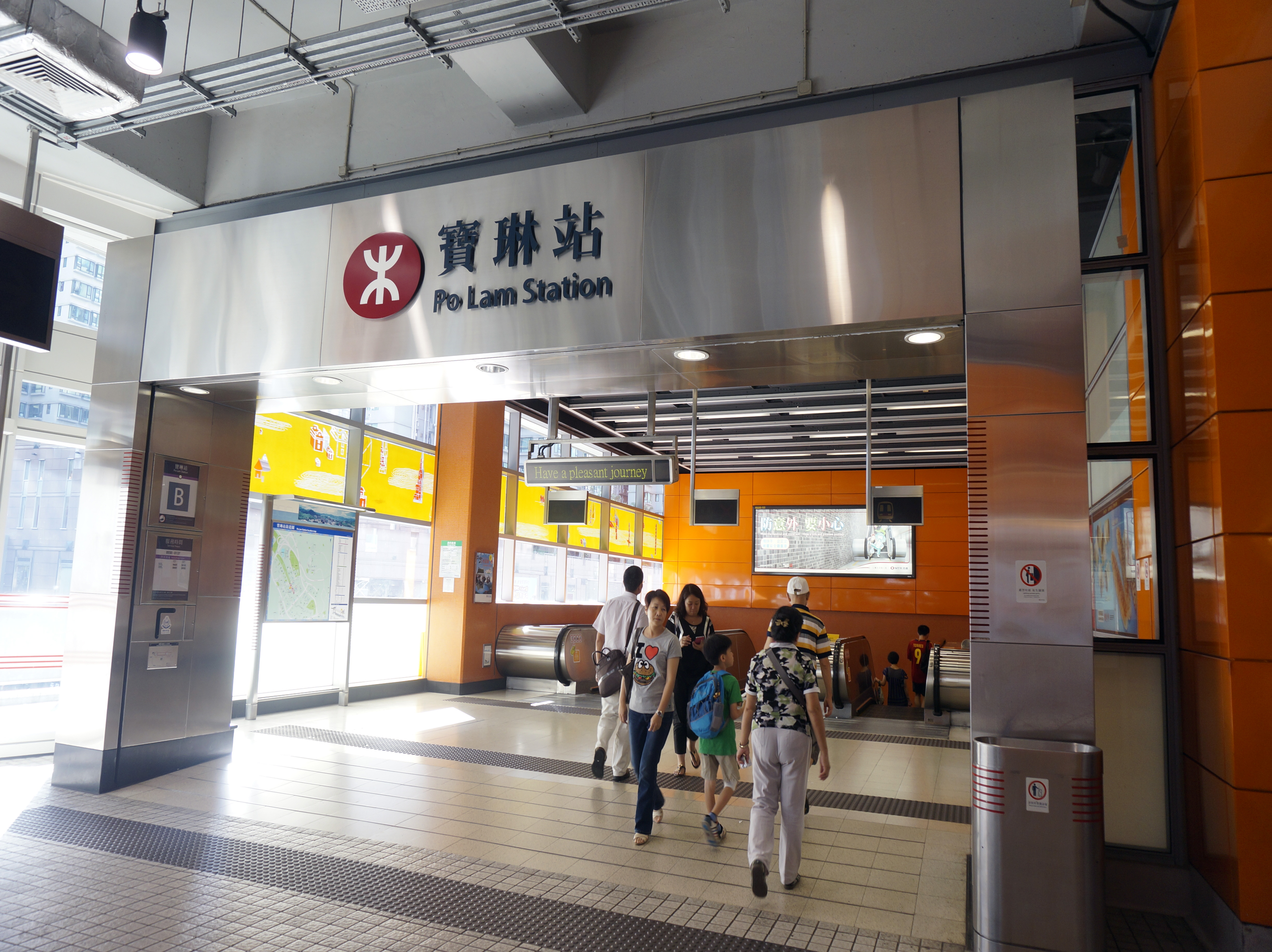 港鐵寶琳站B出入口